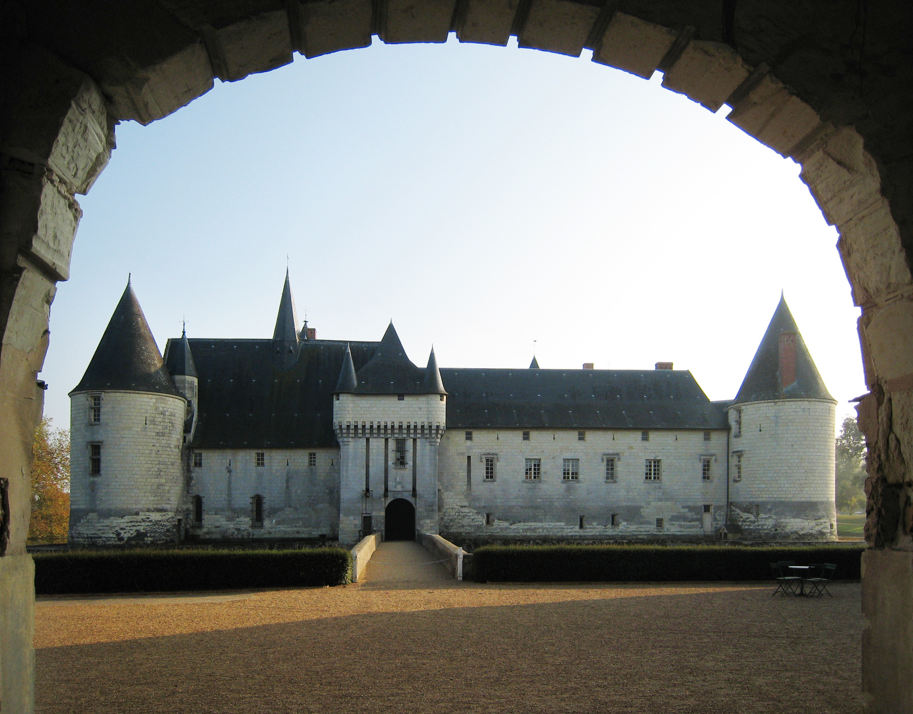 Castle Le Plessis-Bourré, located near the village of Écuillé in the county of Maine-et-Loire/France